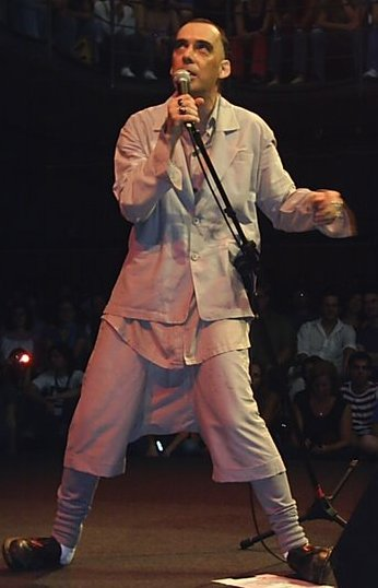 Arnaldo Antunes em show no Centro Cultural São Paulo.